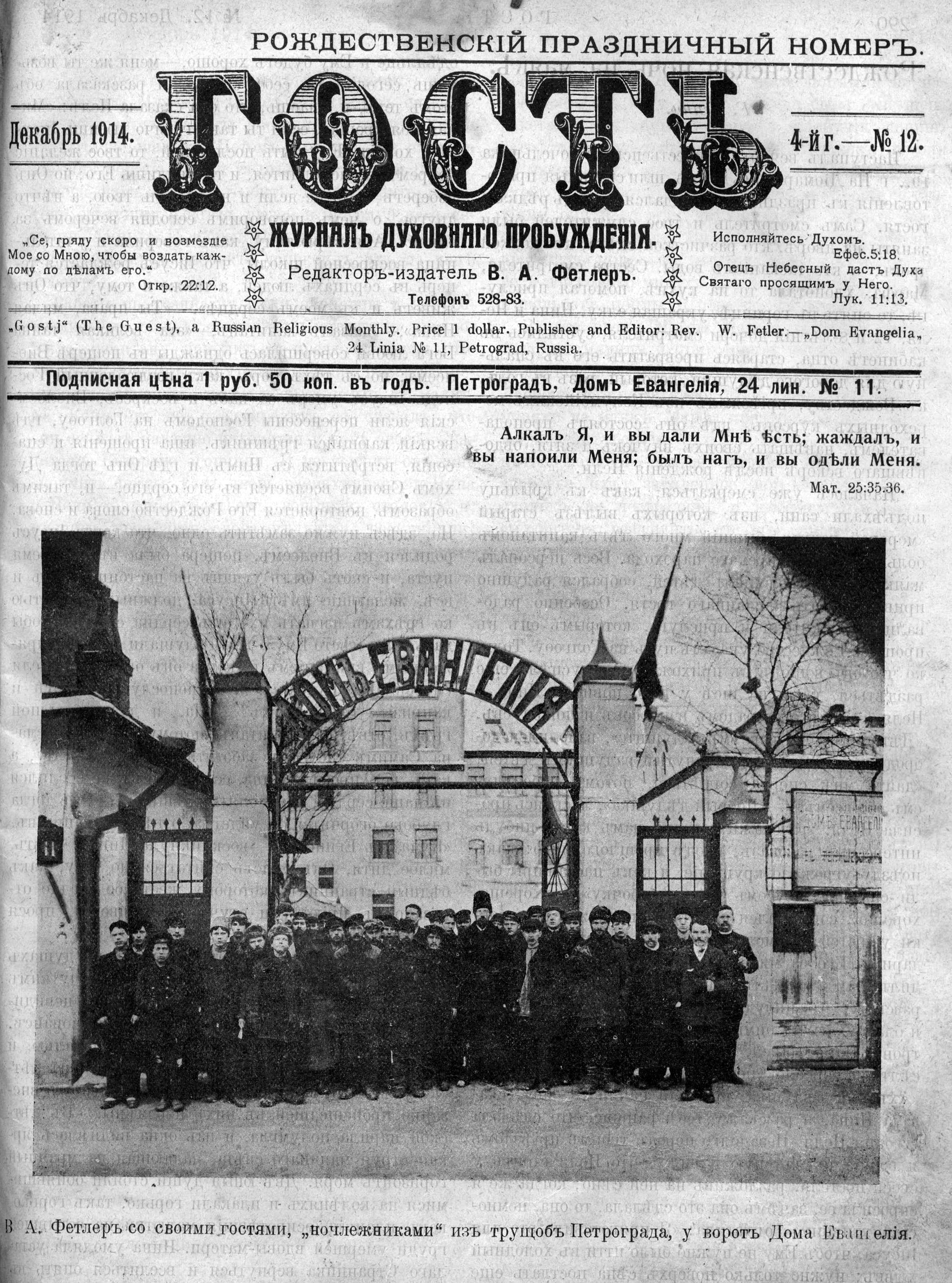 Обложка журнала "Гость" №12 за декабрь 1914 года с фотографией Вильгельма Андреевича Фетлера и его паствой на фоне Дома Евангелия в Петербурге